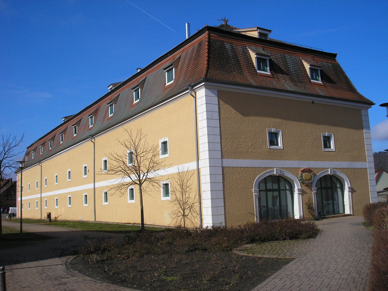 Das Zeughaus in Bad Berka (Thüringen).